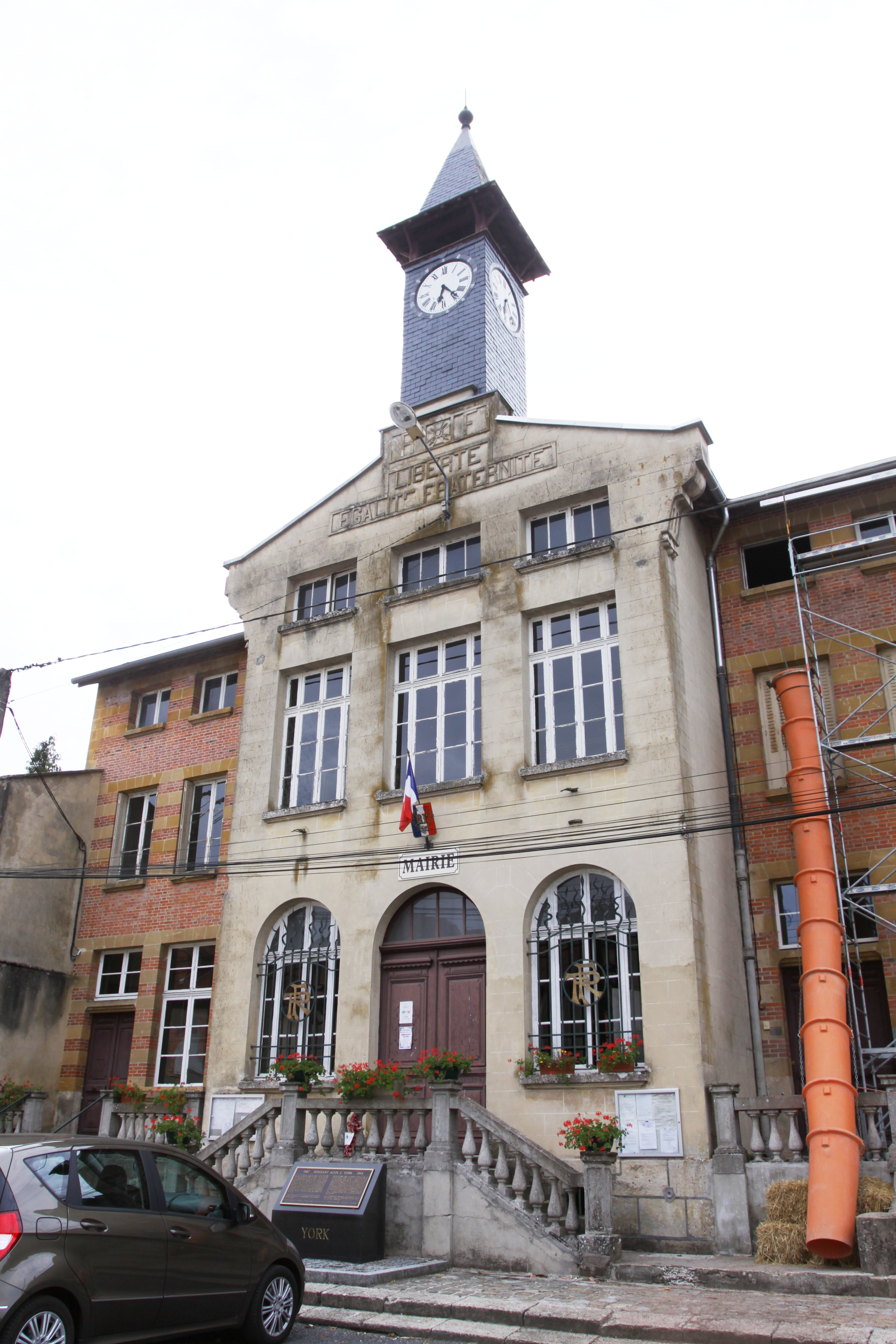 Village Ardennais